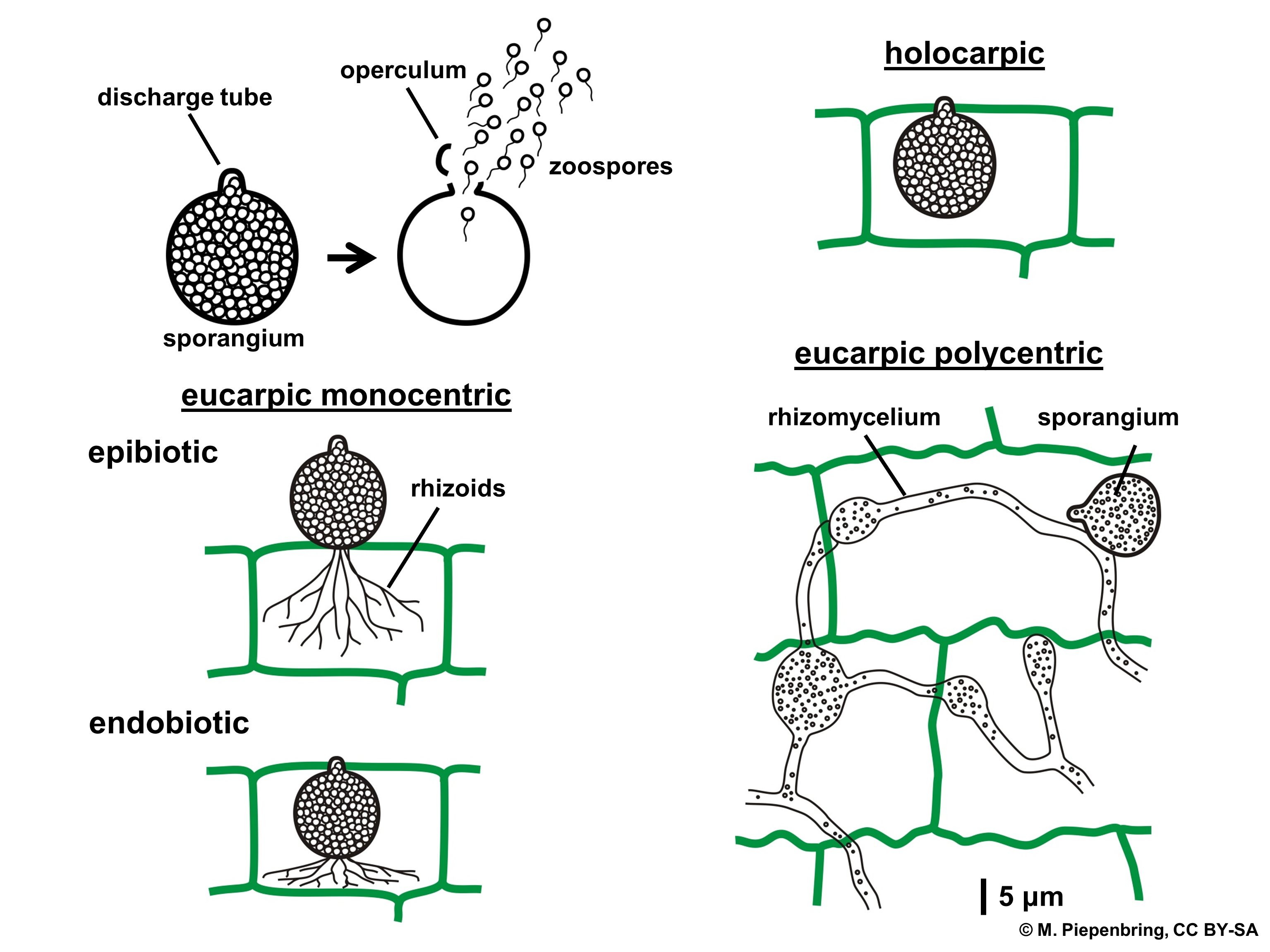 Biologische Schemata, gezeichnet und freigegeben von M. Piepenbring